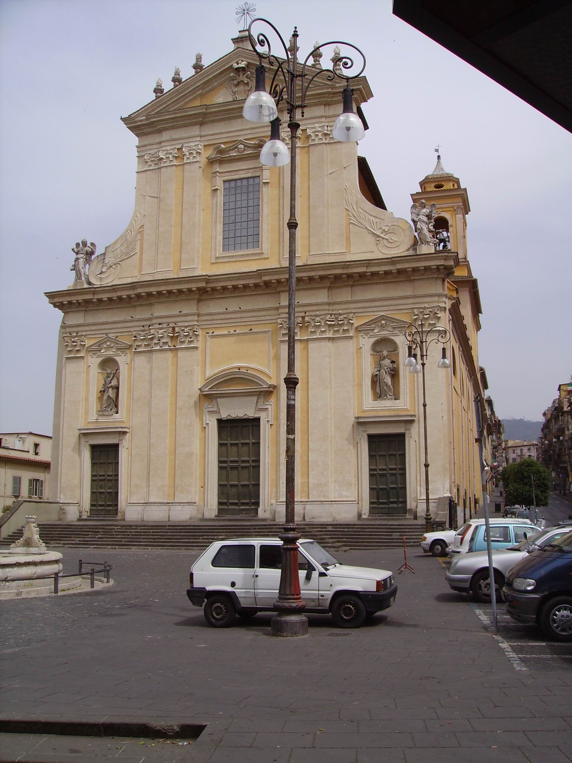 Facciata Basilica di San Barnaba